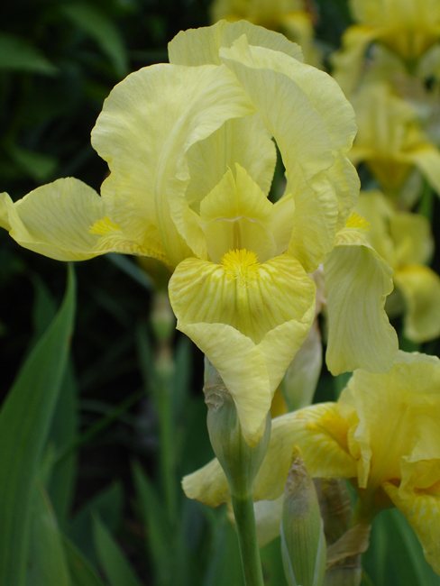 Iris 'Lime Fizz'